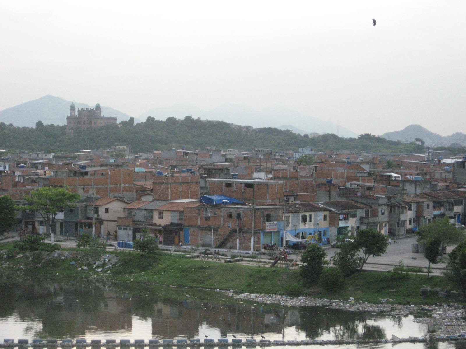 Vista da Favela da Maré, no Rio de Janeiro.